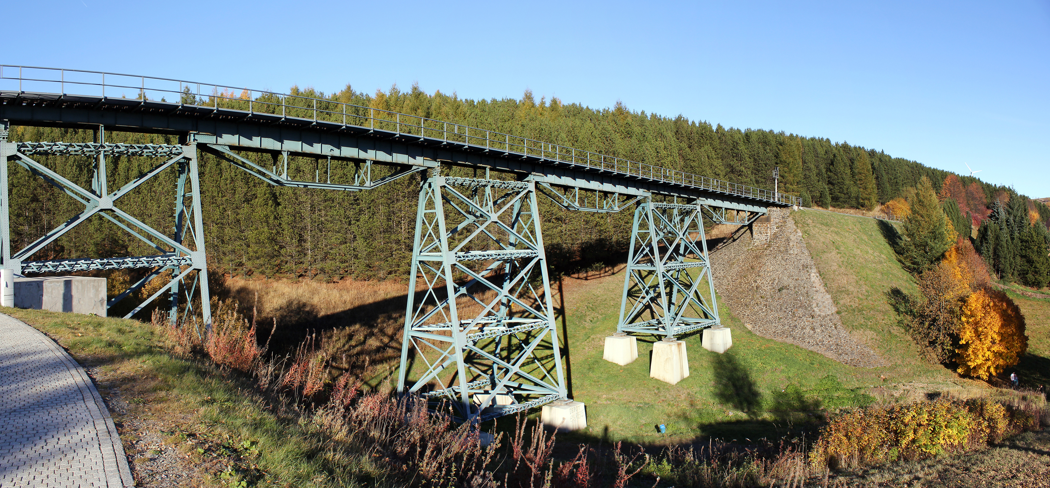 Das Viadukt der Fichtelbergbahn über das Hüttenbachtal, vor Bahnhof Kurort Oberwiesenthal